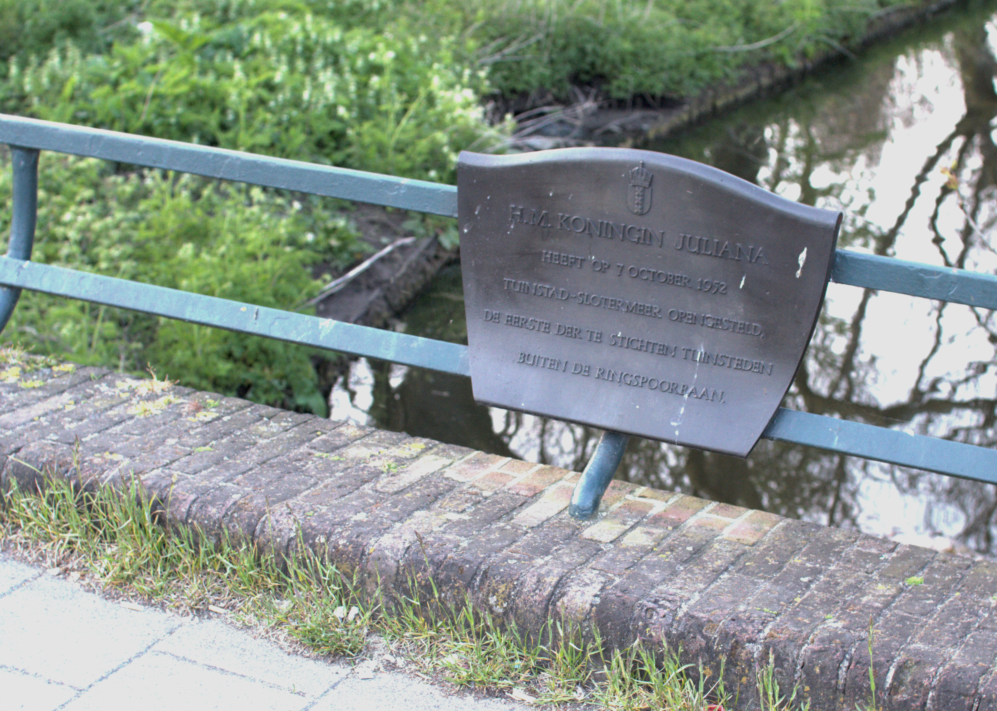 Plaquette op de Hannie Schaftbrug (brug 601) te Amsterdam. De plaquette herinnert aan de opening van de Tuinstad Slotermeer door Koningin Juliana op 7 oktober 1952 als eerste tuinstad buiten de Ringspoordijk.